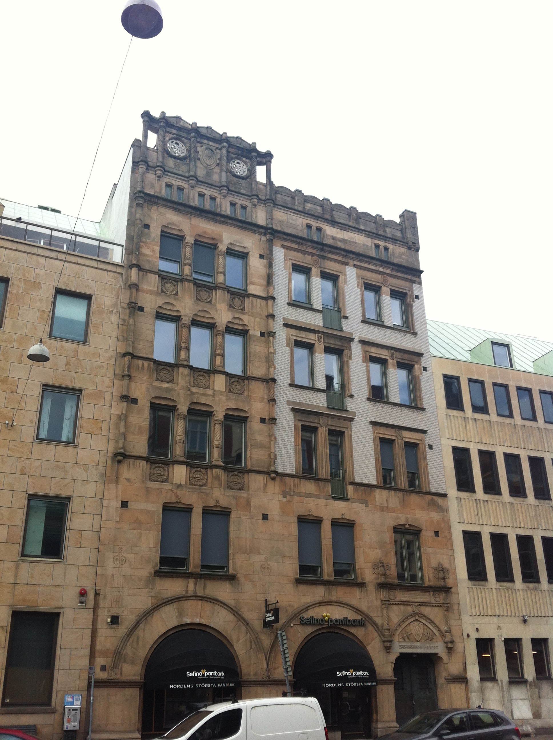 Fasad mot Östergatan